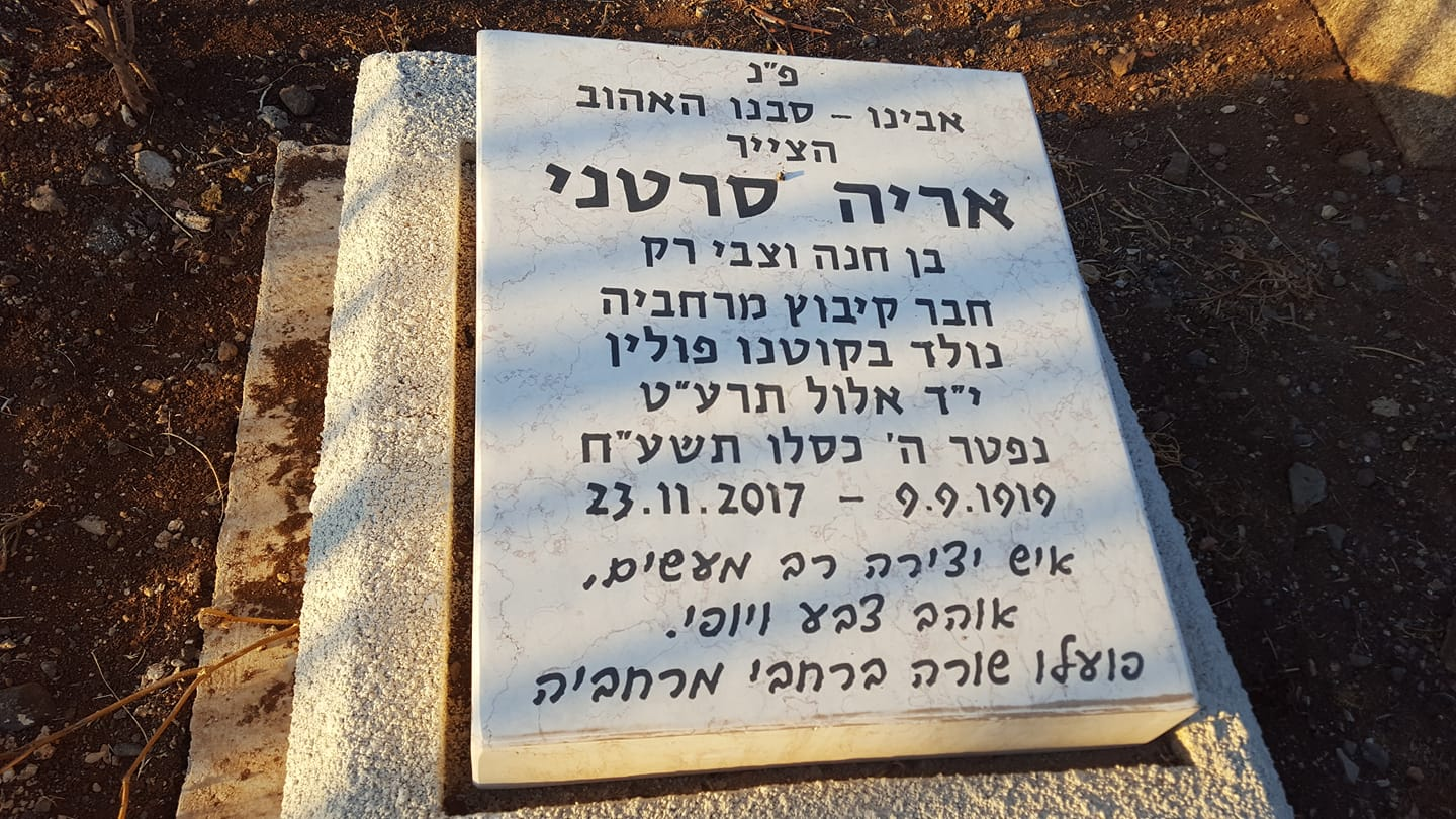 קברו של הצייר אריה סרטני בבית העלמין מרחביה צילום אלי אלון